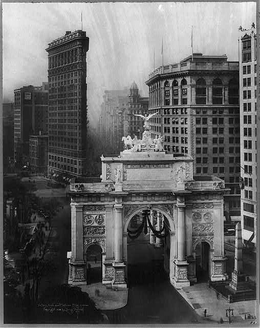 Арх. Томас Гастінгс. Арка перемоги (тимчасова). Нью-Йорк, 1918 р. Фото Бібліотеки Конгреса США